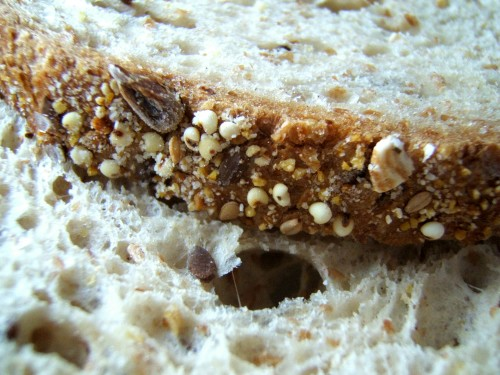 Korst van meergranenbrood